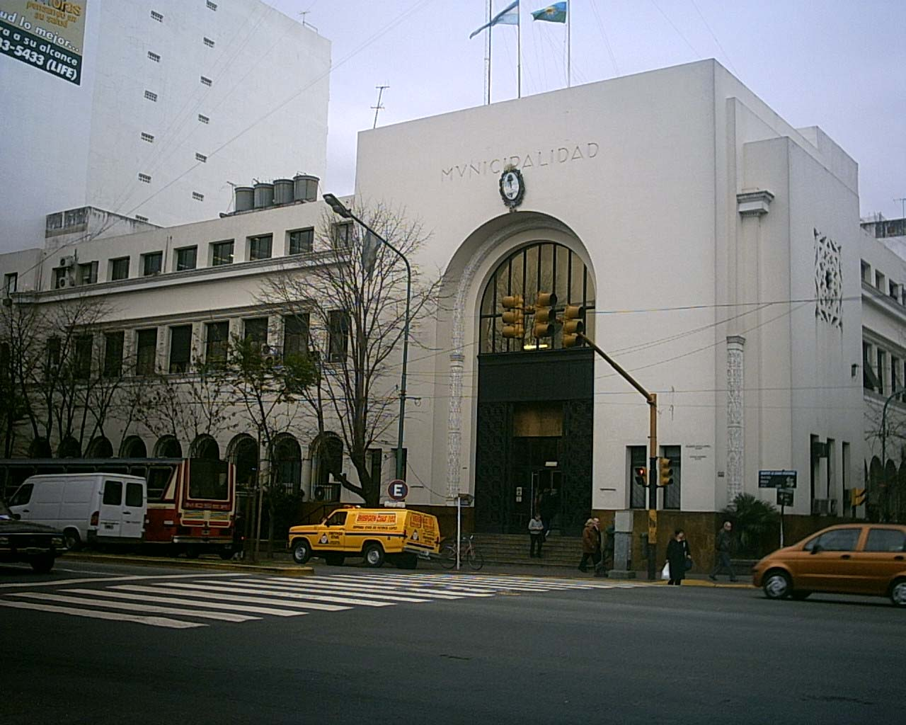 Edificio de la Municipalidad de Vicente Lopez sobre la calle Maipú.